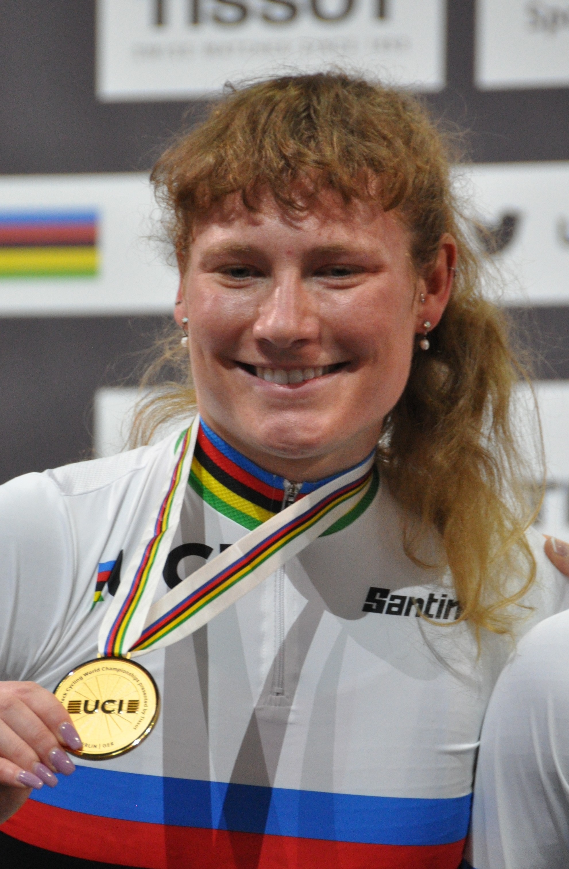 Lily Williams, Radsportlerin aus den USA - Weltmeisterin in der Mannschaftsverfolgung